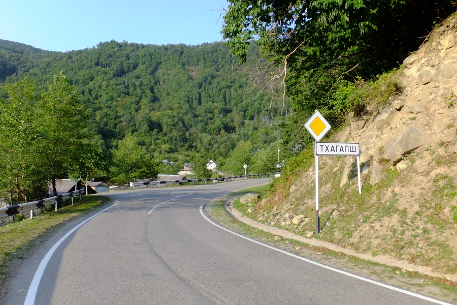 Въезд в аул Тхагапш